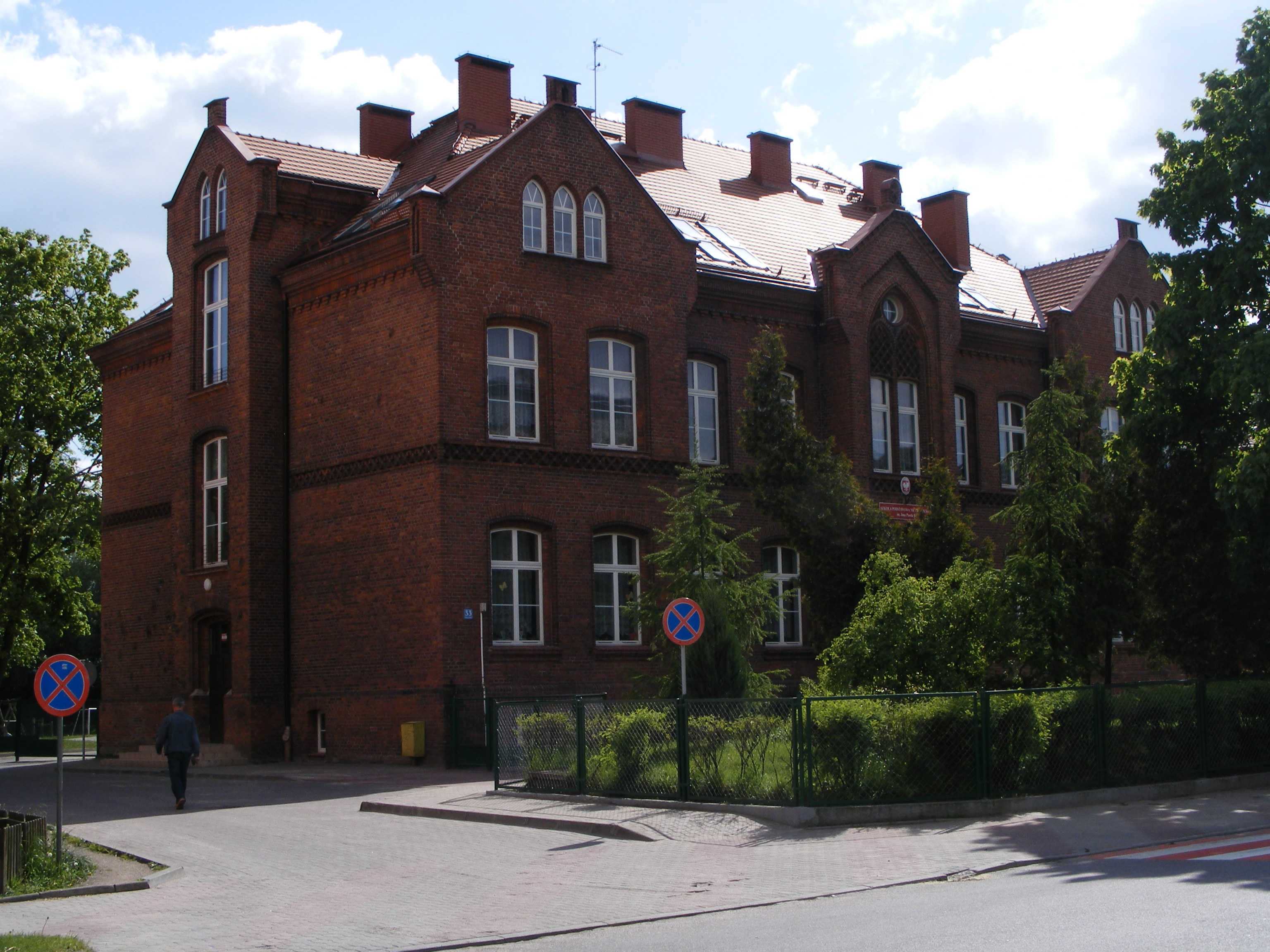 Olecko, ul. Kolejowa 33 - Szkoła Podstawowa Nr 3 im. Jana Pawła II.